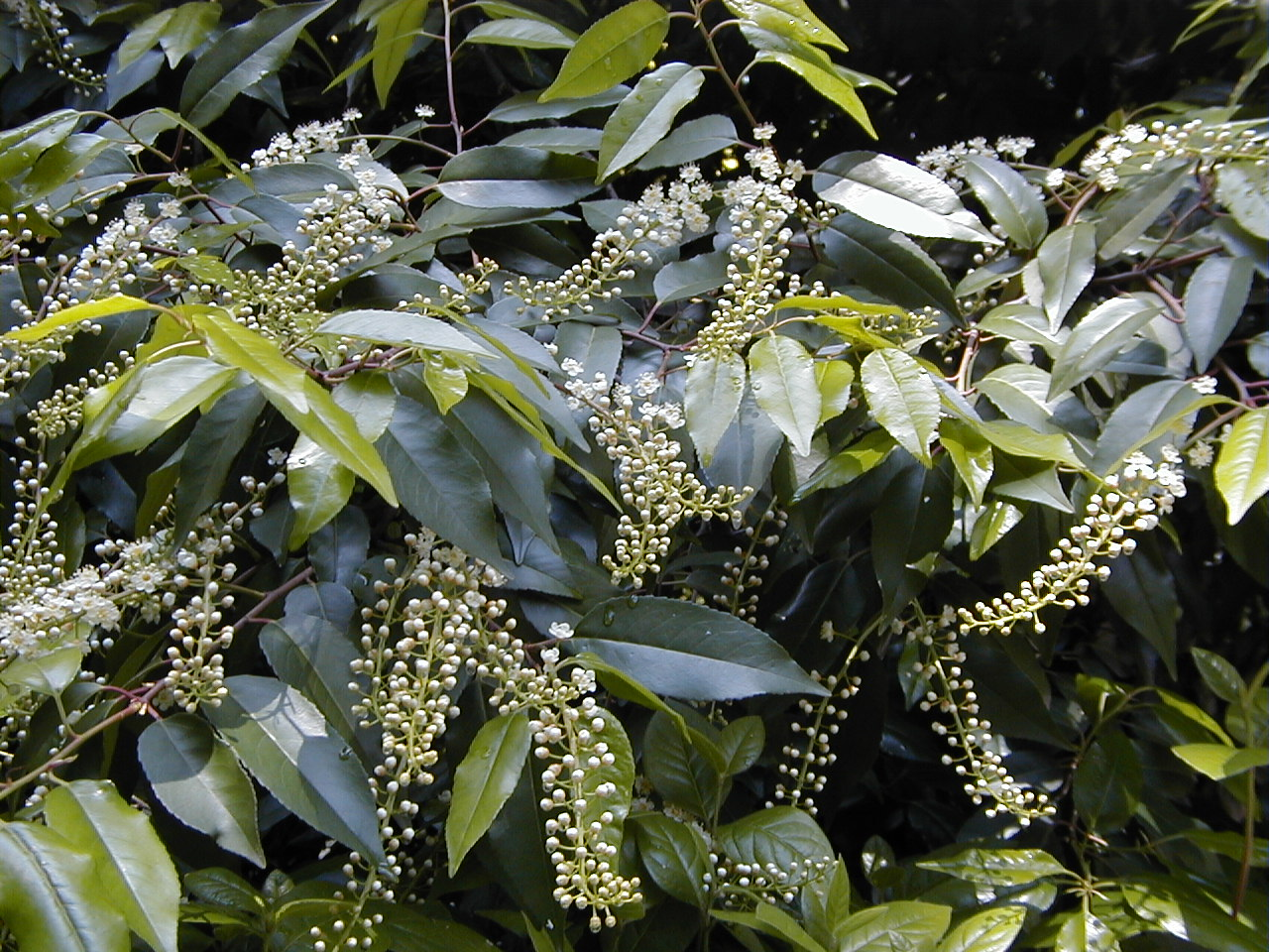 Prunus lusitanica. Real Jardín Botánico, Madrid.